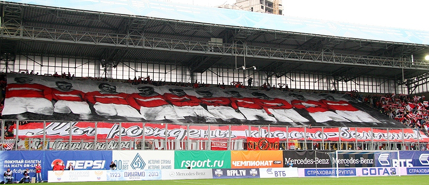 Перфоманс на выездном дерби с "Динамо"